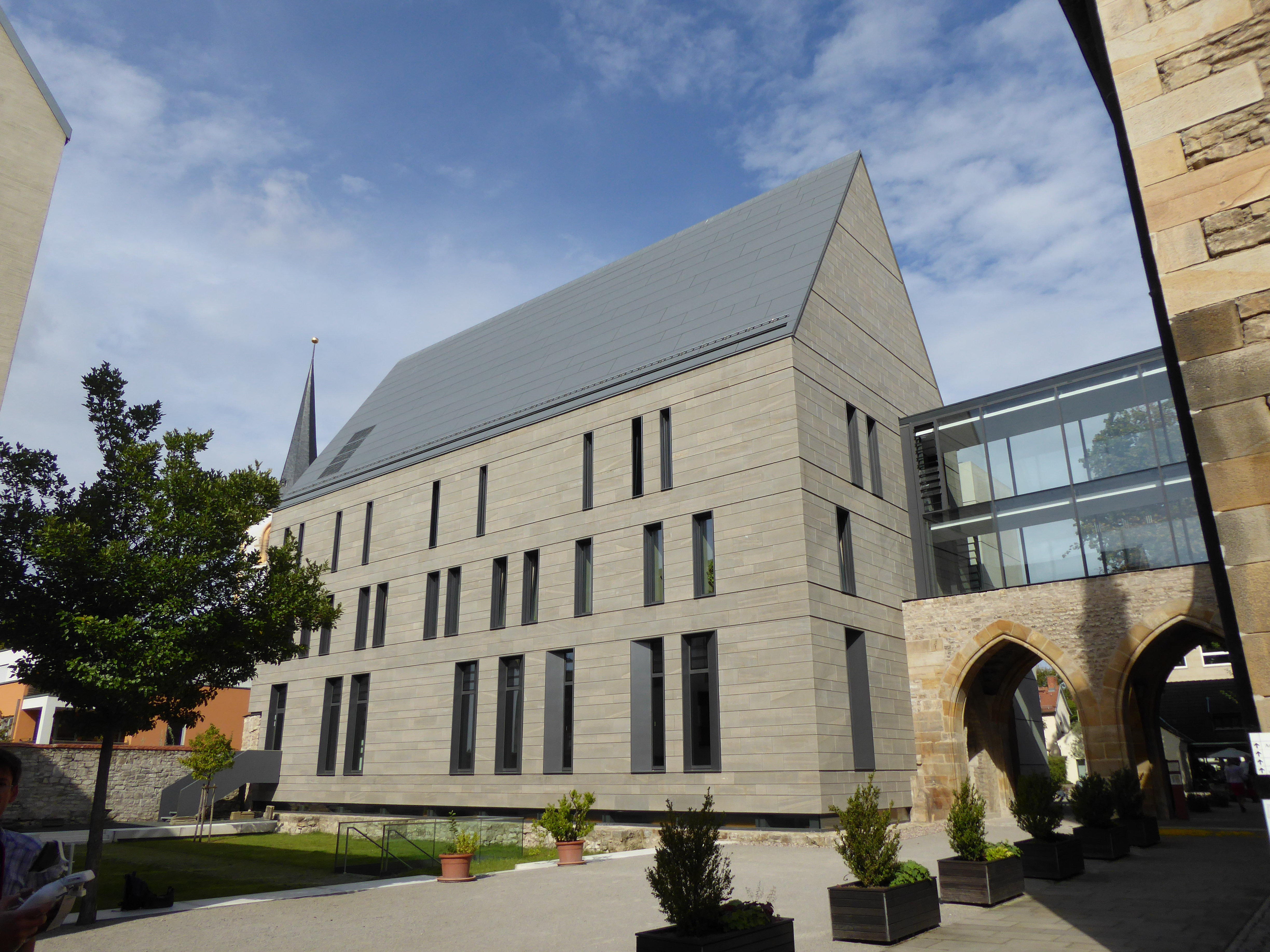 Augustinerkloster Erfurt; Bibliothek